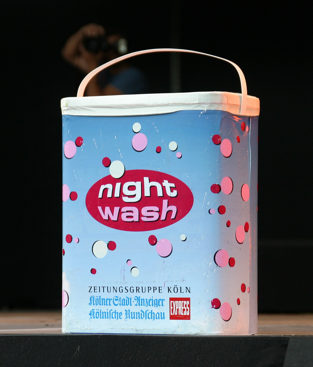 Dekoration einer Live-Night-Wash-Comedyshow in Köln